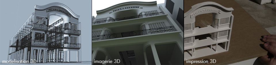 impression 3D (oeuvre dérivée du Palais du Commerce (Paris))